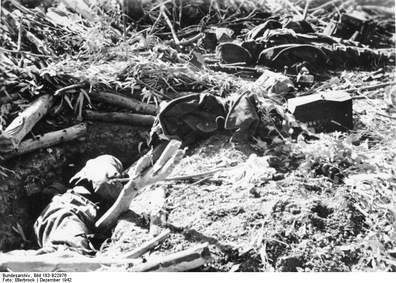 Die blutigen Verluste der Briten in Afrika sind groß Stellungen der britischen Landungarmee in Tunesien, die von den deutschen Truppen überrannt wurden. Die blutigen Verluste der Engländer waren sehr groß. PK-Aufnahme: Kriegsberichter Ellerbrock 17.12.1942 [Herausgabedatum]